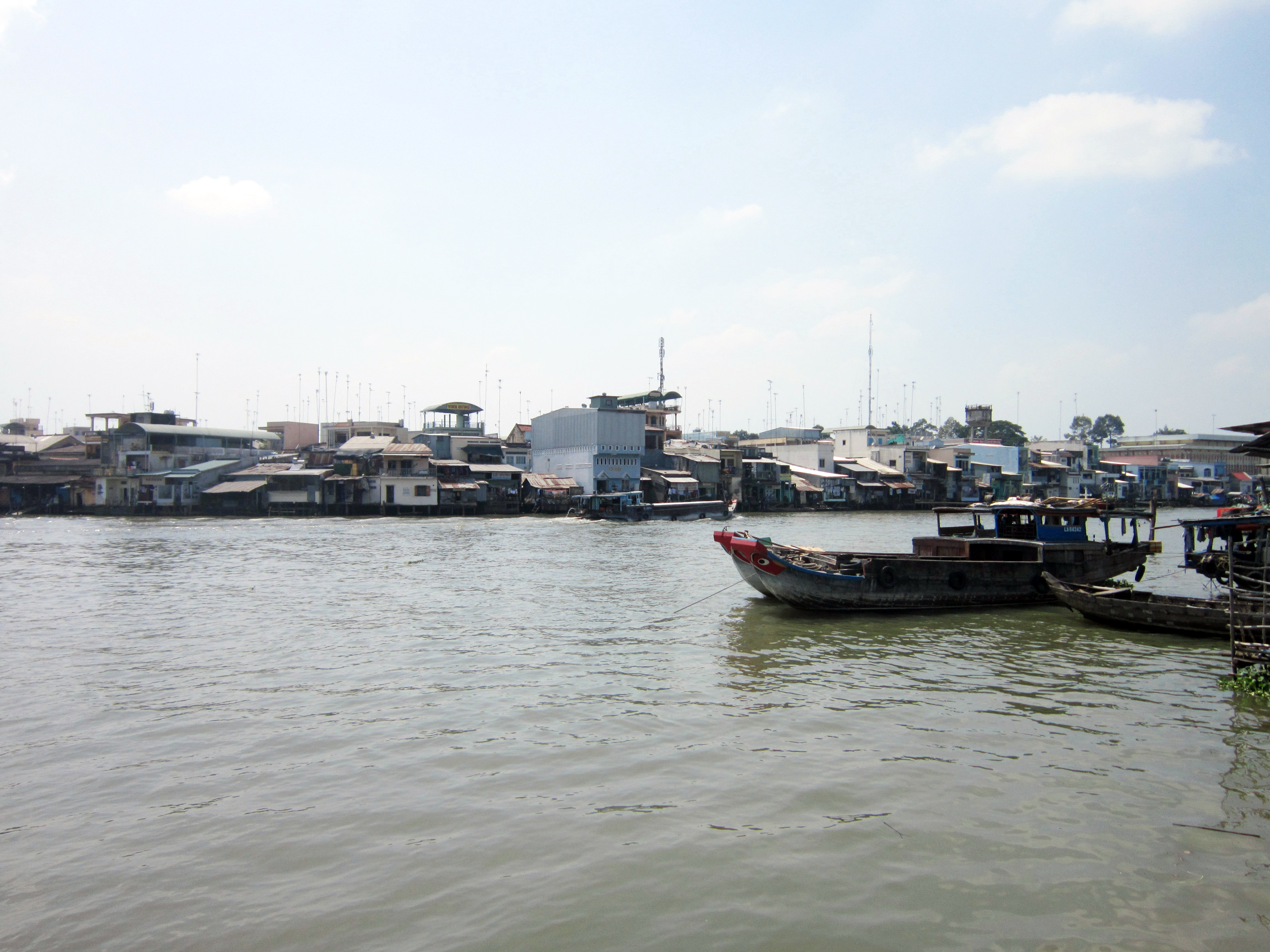 Sông Cái Bè, đoạn chảy qua thị trấn Cái Bè (Tiền Giang, Việt Nam).